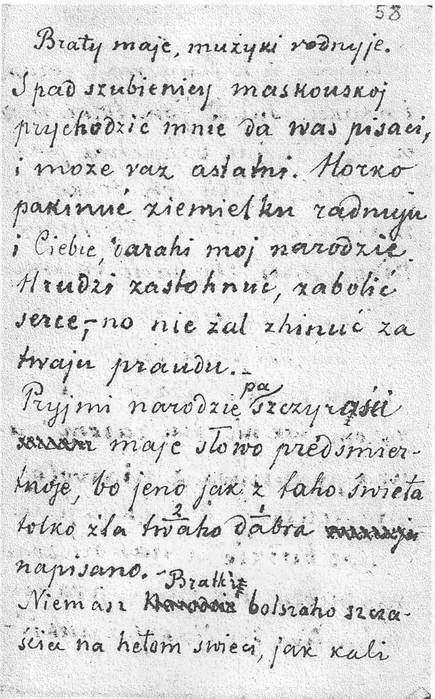 Другі "ліст з-пад шыбеніцы" Каліноўскага